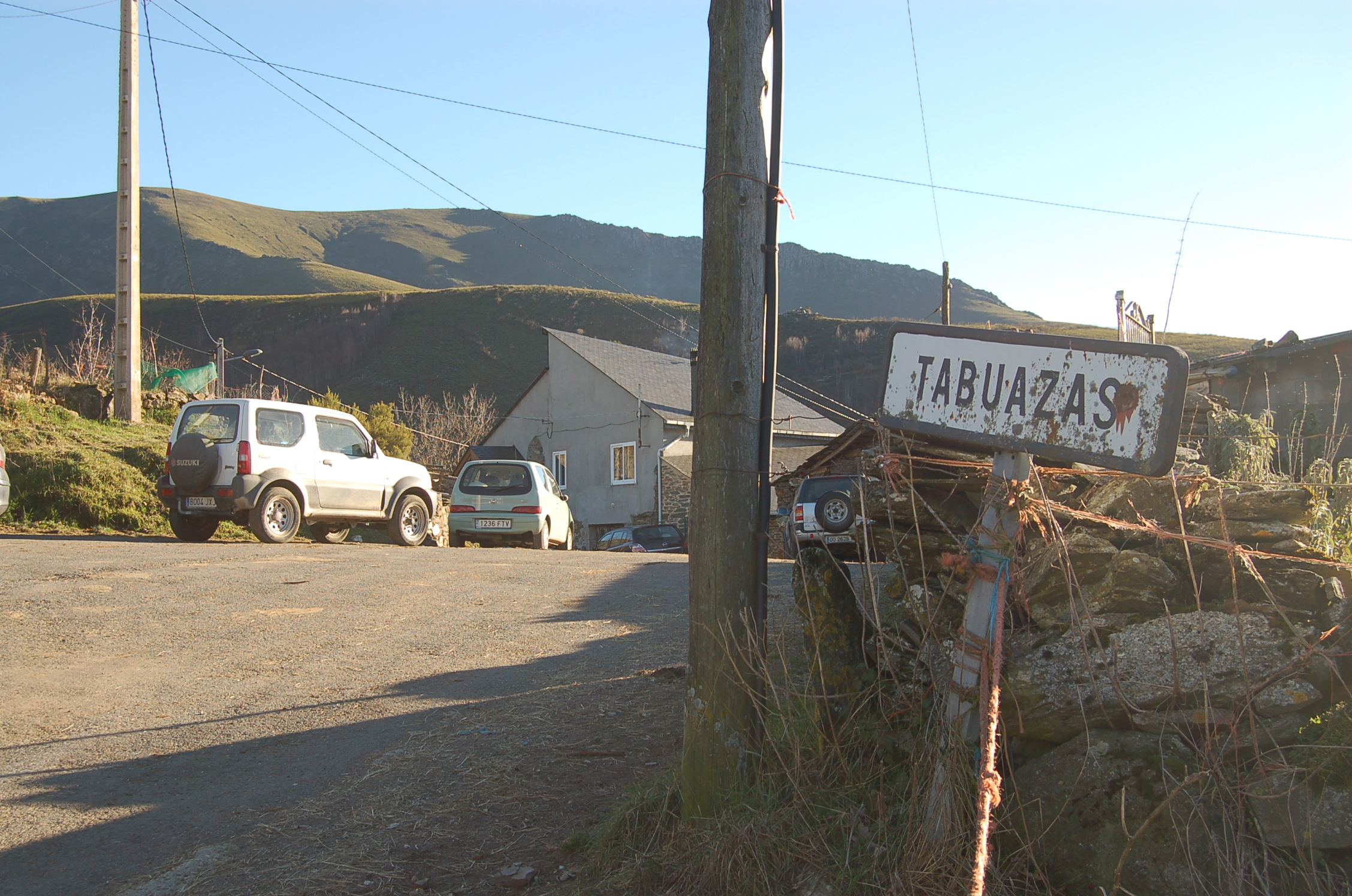 Aldea das Taboazas